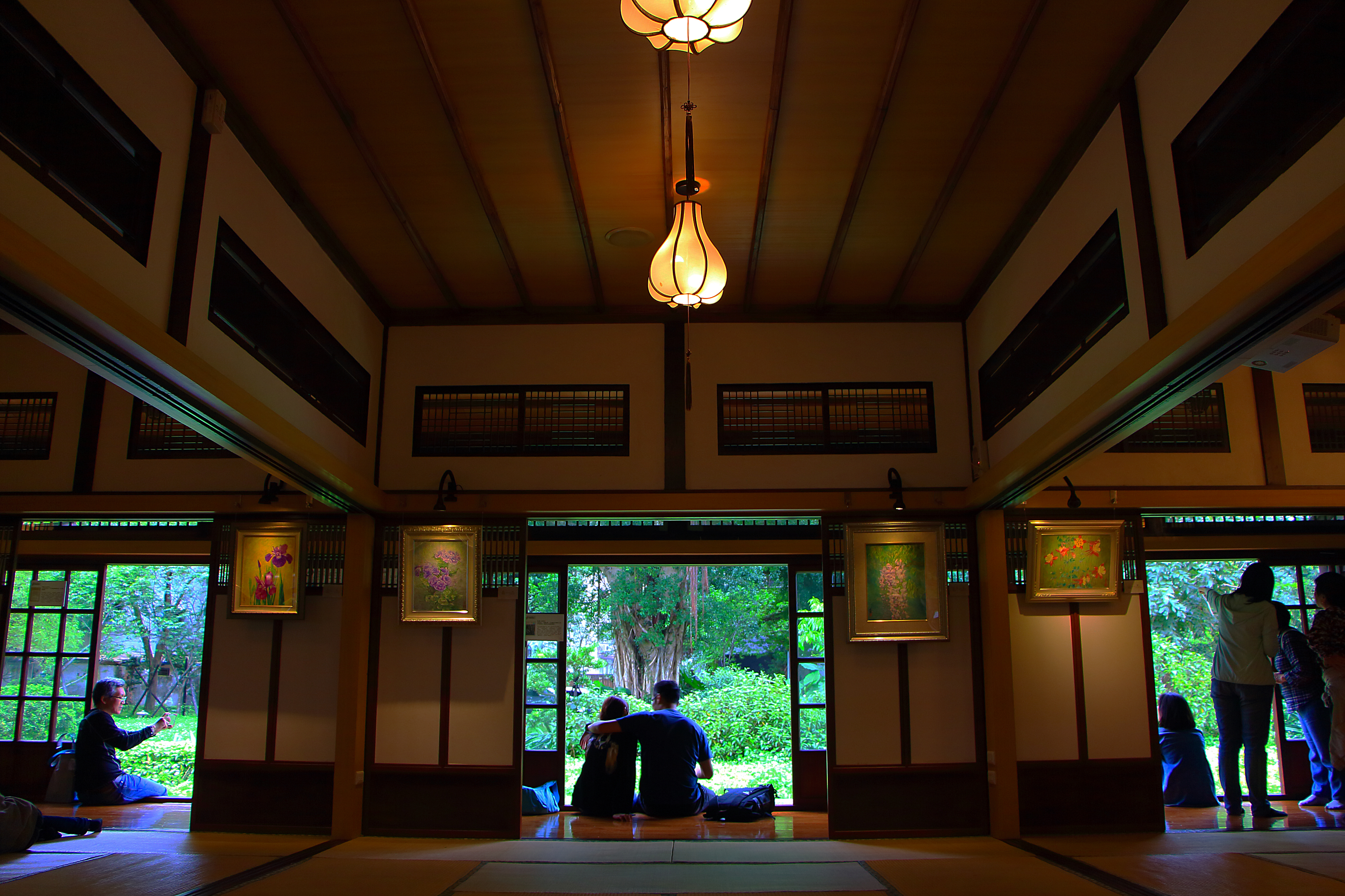 紀州庵離屋內部